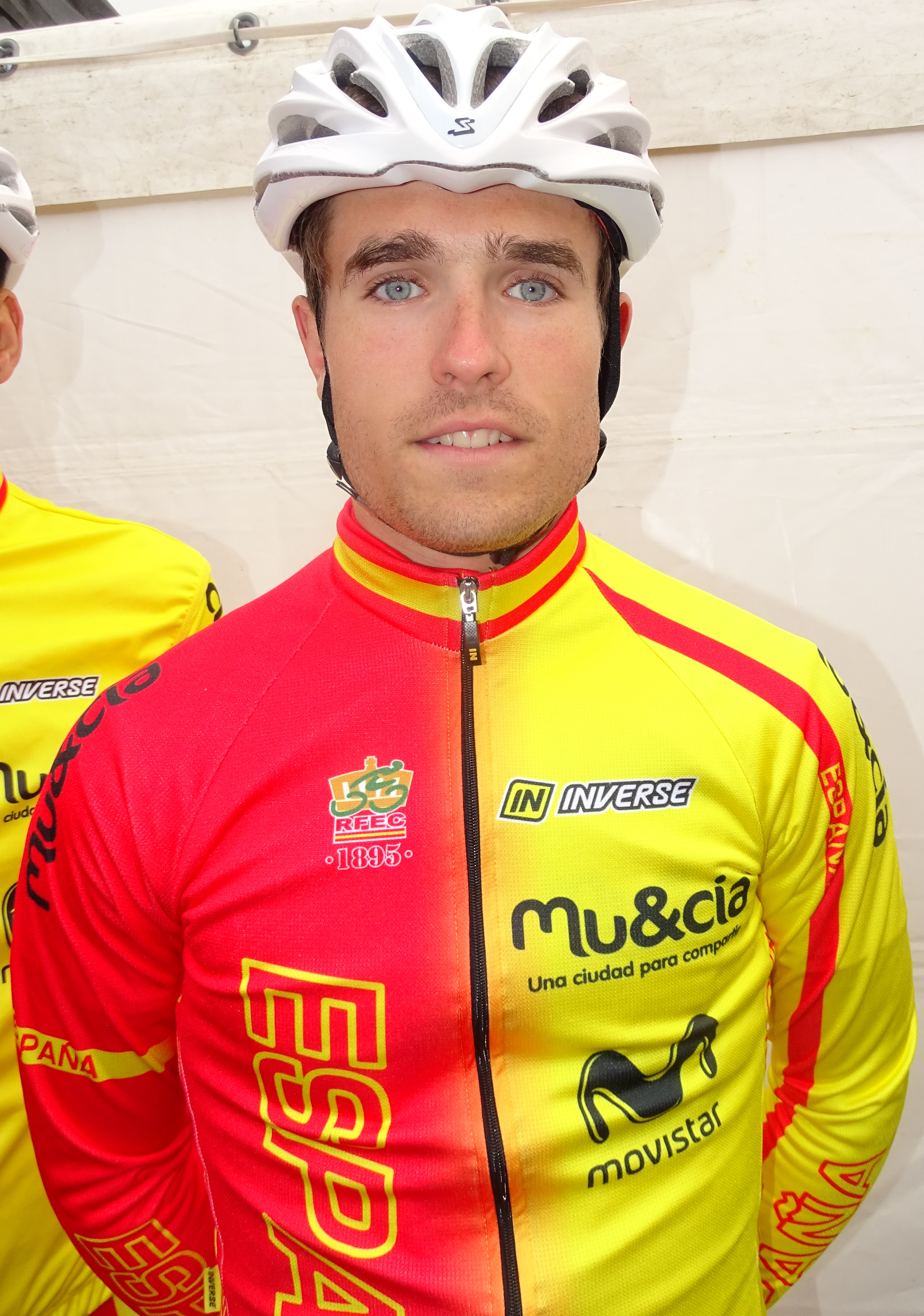 Reportage réalisé le samedi 11 avril à l'occasion du départ et de l'arrivée du Tour des Flandres espoirs 2015 à Audenarde, Belgique.